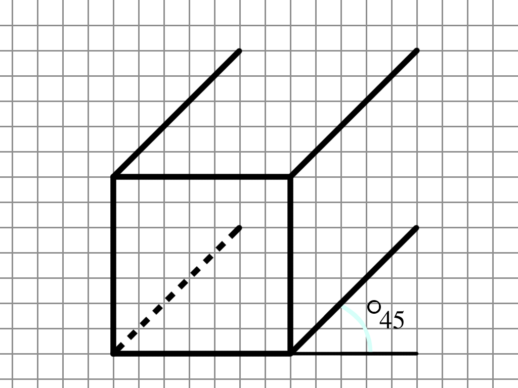 الخطوة الثانية من عملية رسم المكعب: رسم العمق (البعد الثالث)